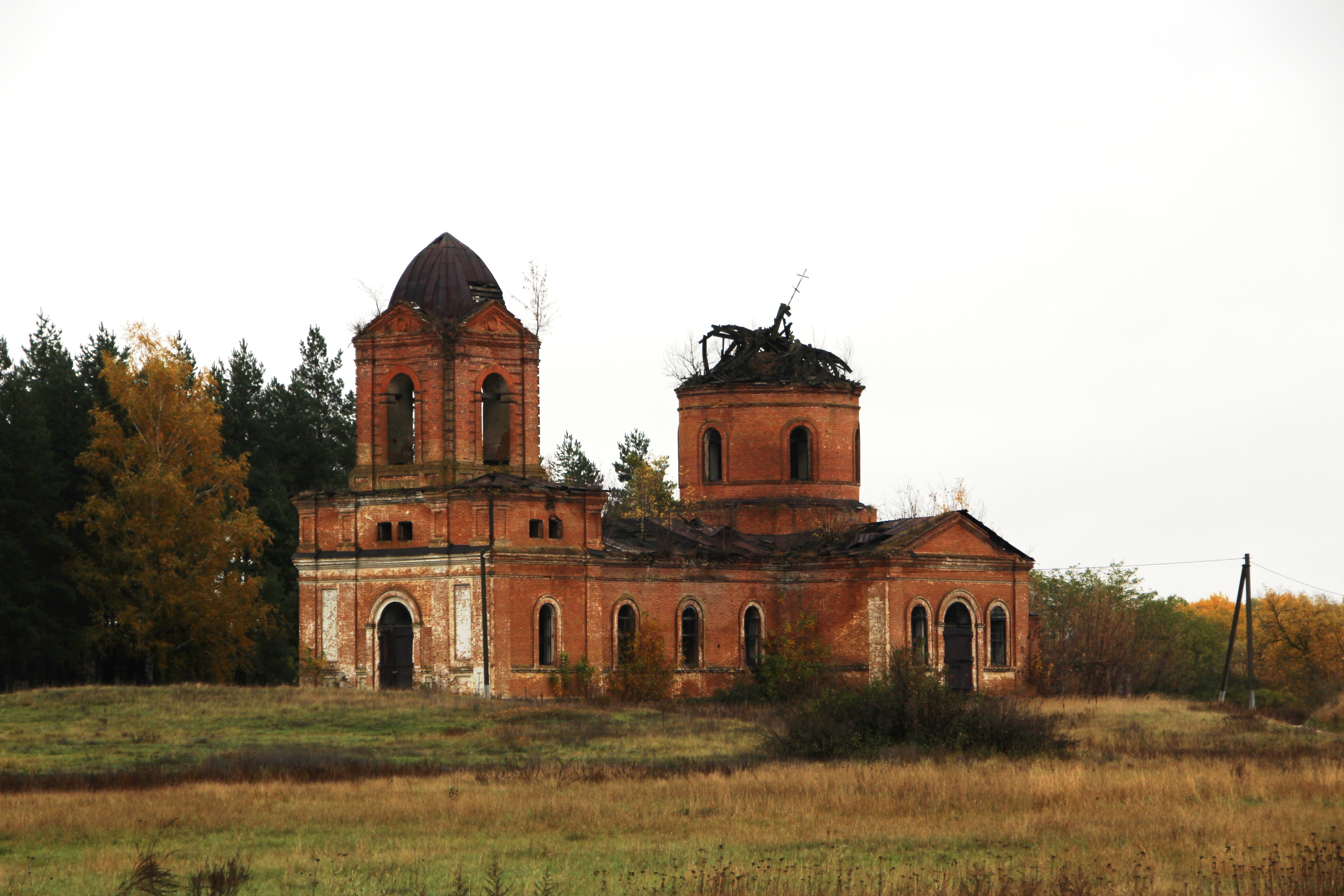 Свято-Димитріївська церква (мур.), село Бишкінь, вул. Перемоги, 48а